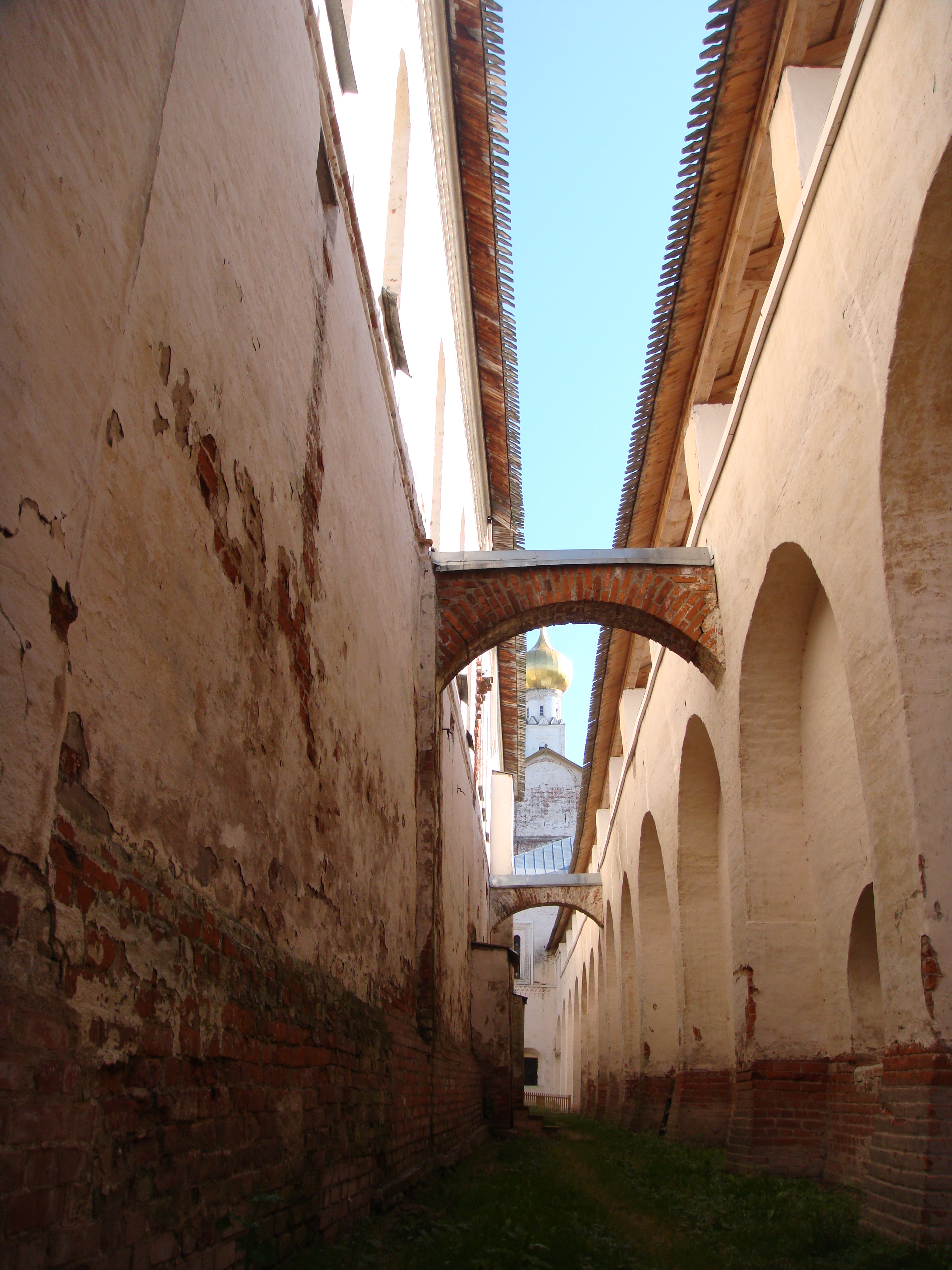 Простенок